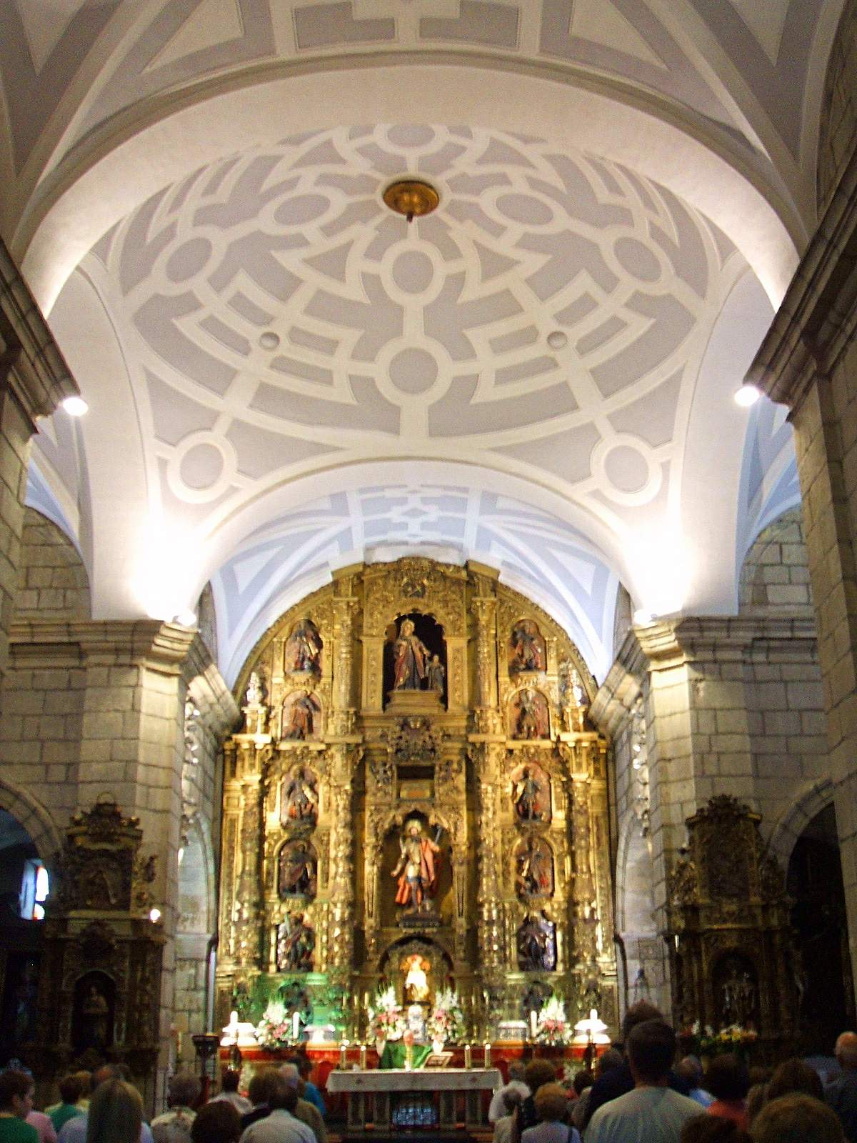 León - Iglesia de San Marcelo